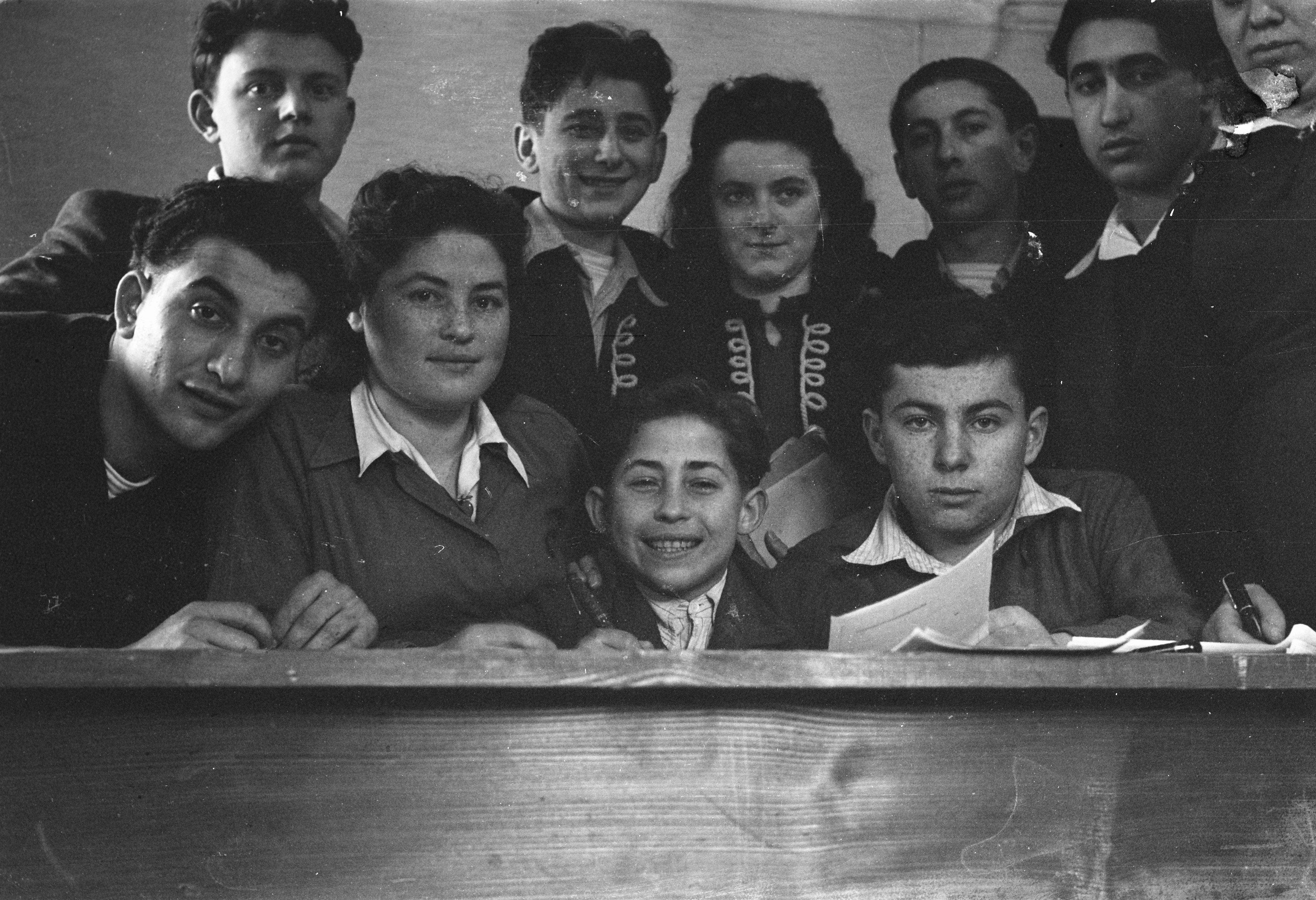 Collectie / Archief : Fotocollectie Anefo Reportage / Serie : [ onbekend ] Beschrijving : Tehuis in Duitsland voor Joodse mensen, die ontslagen zijn uit concentratiekampen en dergelijke Datum : 11 maart 1946 Locatie : Duitsland Trefwoorden : CONCENTRATIEKAMPEN, MENSEN, ONTSLAGEN Fotograaf : Jozefson, […] / Anefo Auteursrechthebbende : Nationaal Archief Materiaalsoort : Negatief (zwart/wit) Nummer archiefinventaris : bekijk toegang 2.24.01.05 Bestanddeelnummer : 901-5577